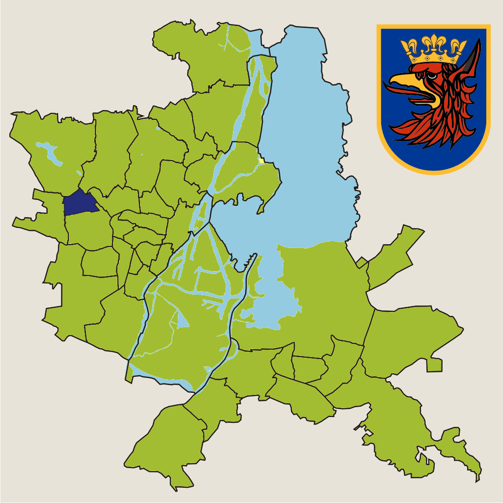 Osiedle "Zawadzkiego-Klonowica" w Szczecinie – jednostka pomocnicza miasta w 2010